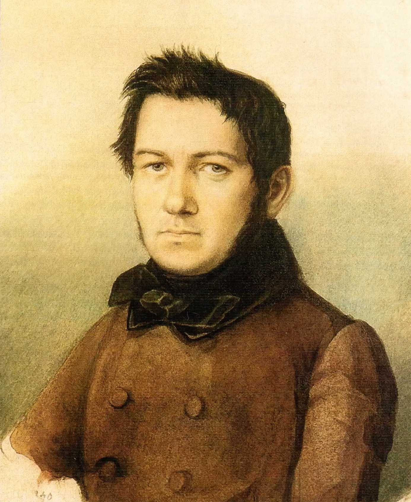 Михаил Иванович Глинка (1804-1857)